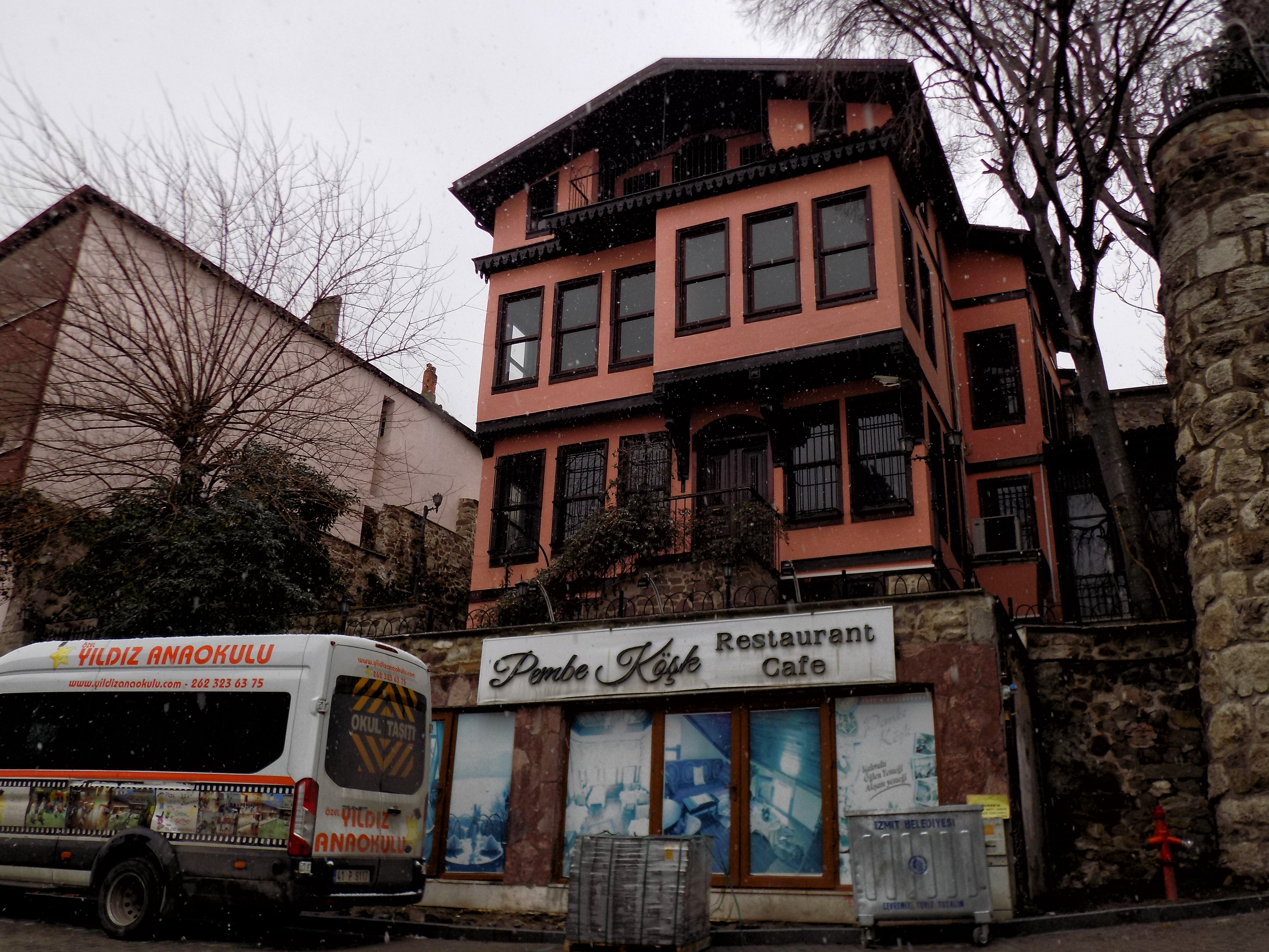 Kocaeli'deki tarihî Pembe Köşk.